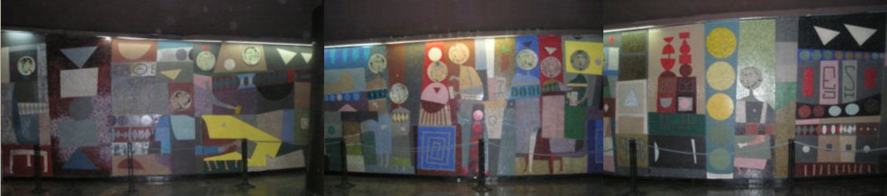 Hall de entrada del Teatro San Martín de Buenos Aires. Mural "Alegoría" de Juan Batlle Planas (completo reconstruido mediante la adición de tres fotos distintas). Fue realizado en 1959 y mide 25 metros. El mural contiene una inscripción del pintor dedicada a su esposa Estela, que dice "Yo y tú llevamos mas que bestias, como animales penetrados, por la sabiduría/ y dejamos estela/ alimentados por la bondad que el vacío adquiere por el amor. Juan Batlle Planas."